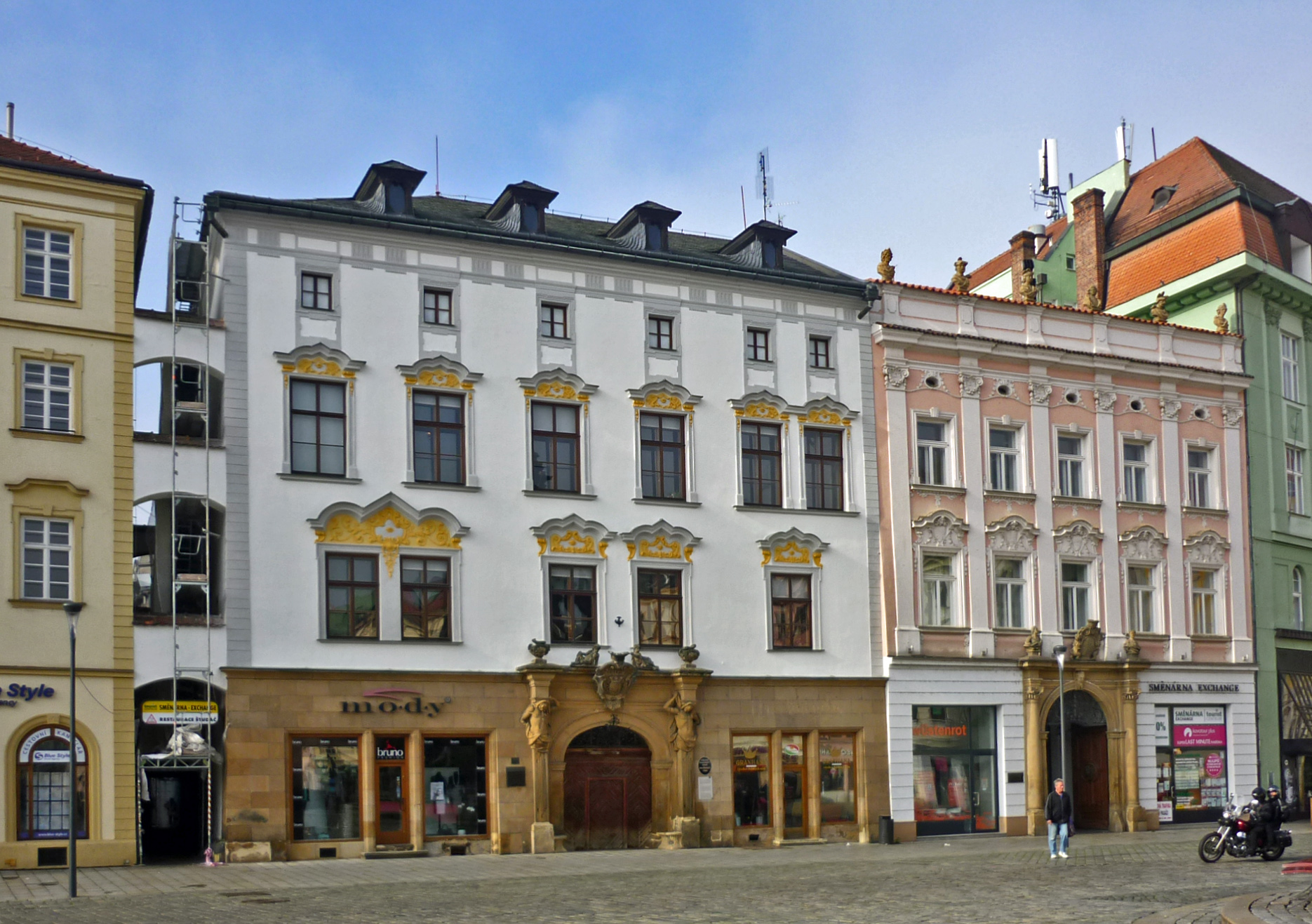 Petrasch-Palais in Olmütz (Olomouc) in Mähren